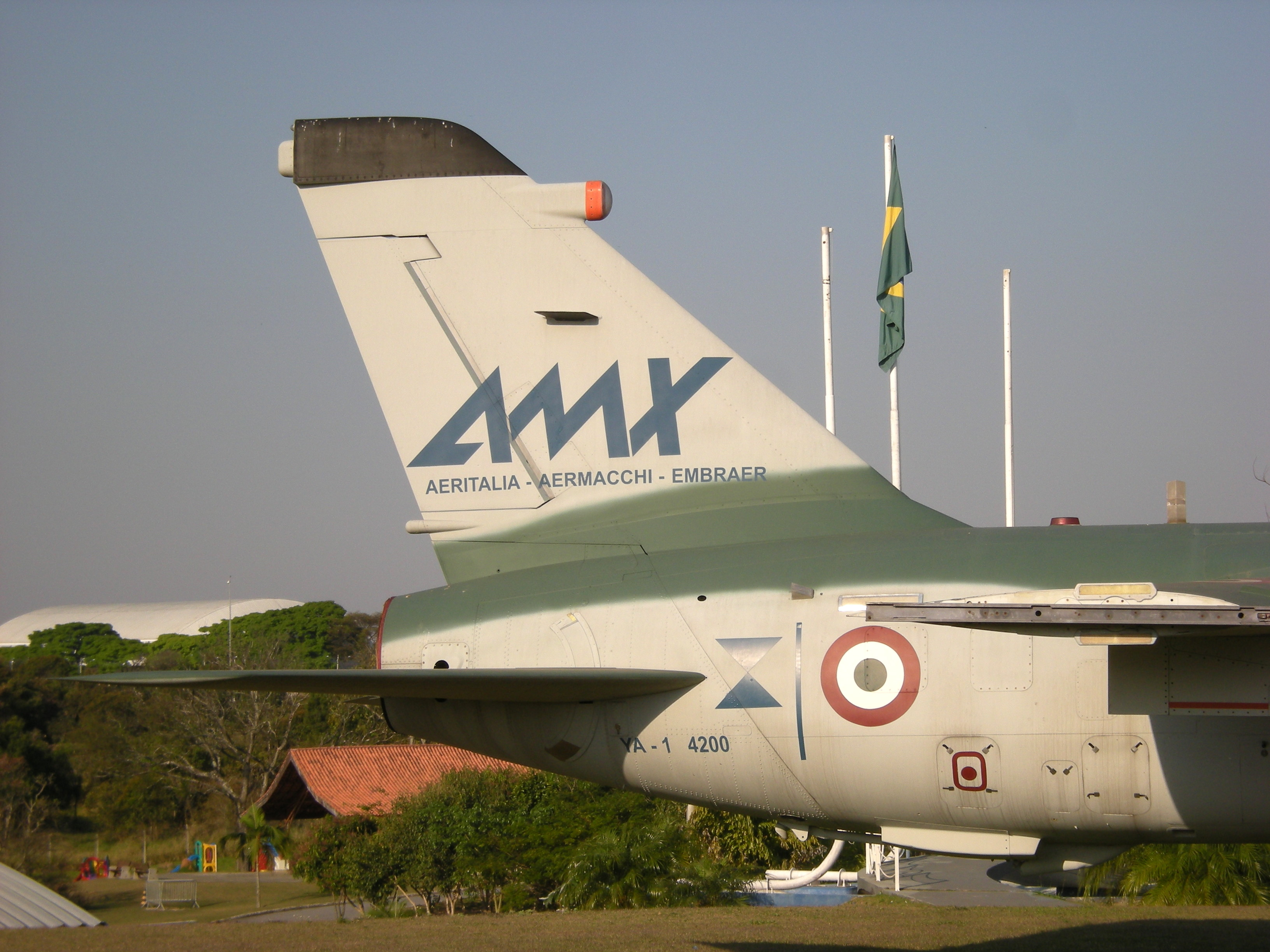 Brazilian Aerospace Memorial - São José dos Campos